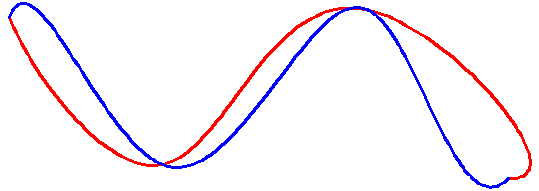 Spline, belang randvoorwaarden zelf, autoCAD